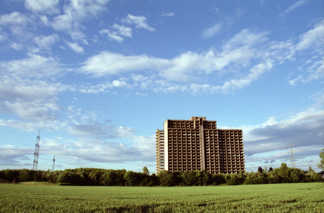 Kaiserbau – Hochhausruine bei Troisdorf, Bonn, Deutschland/Germany.